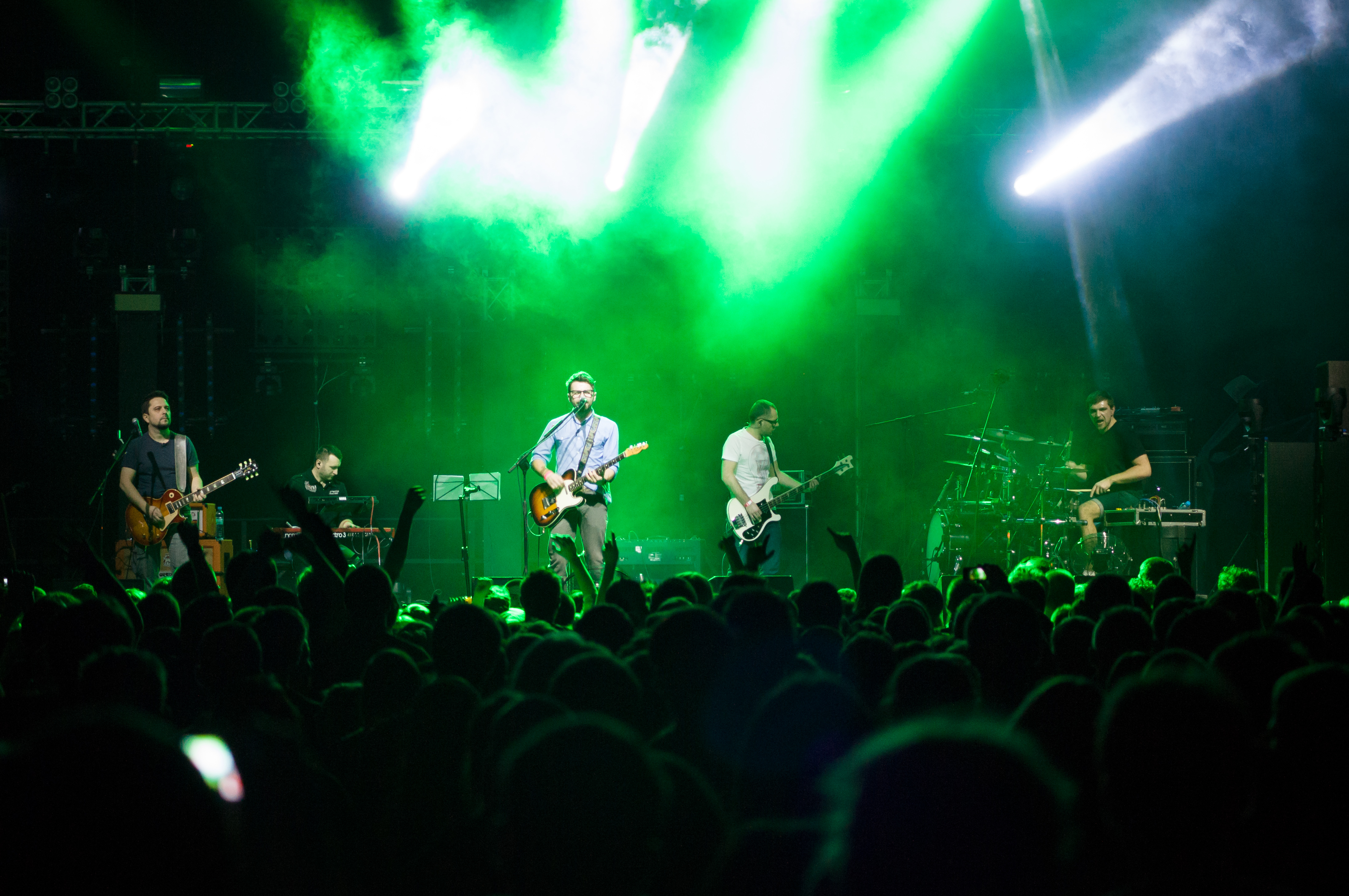 Zespół happysad podczas koncertu na Rocket Festiwal 2013.